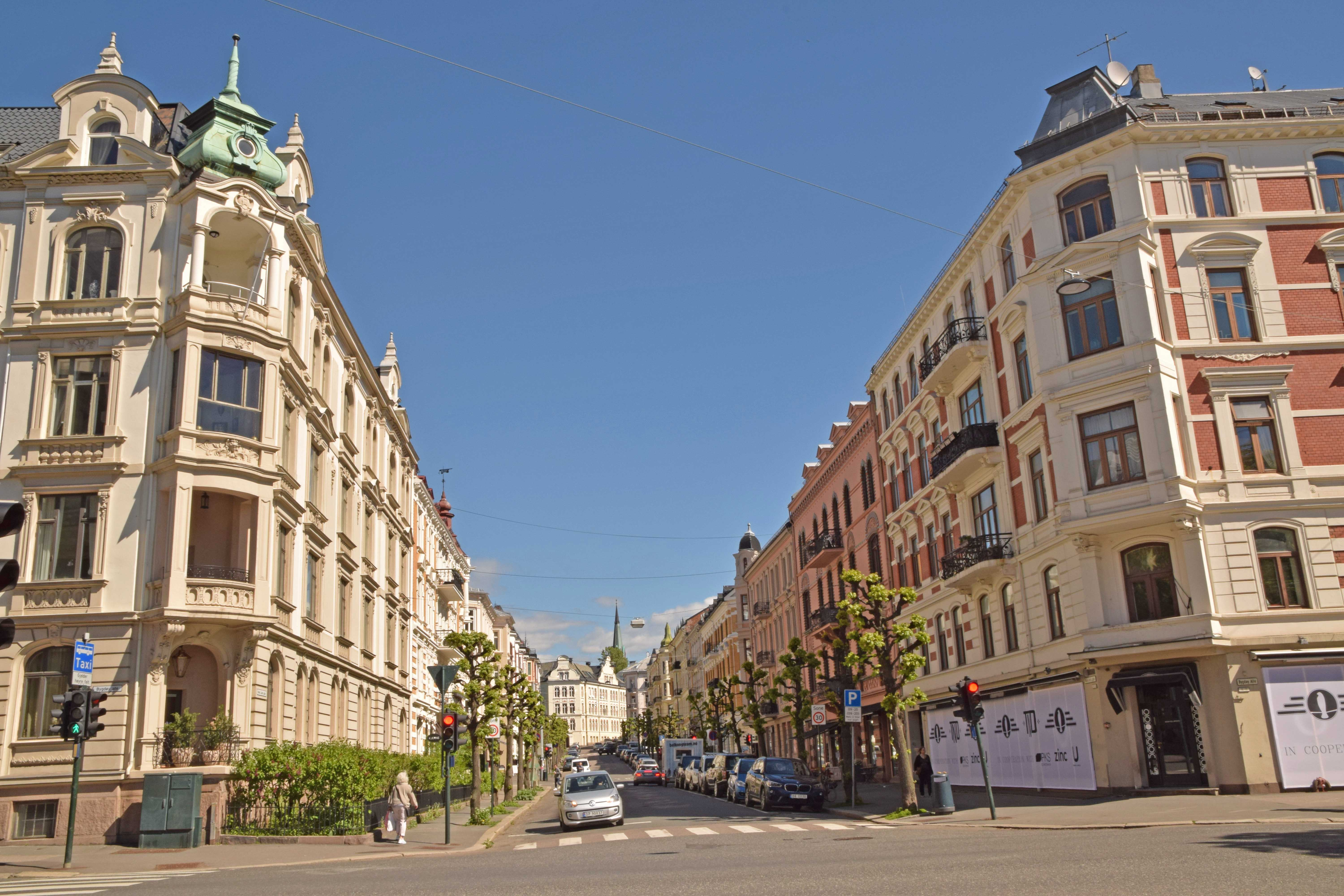 Krysset Bygdøy allé og Niels Juels gate. Bygdøy allé 15 til høyre, 17 til venstre.